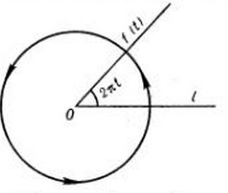 Կոր՝ տոպոլոգիական տարածությունում